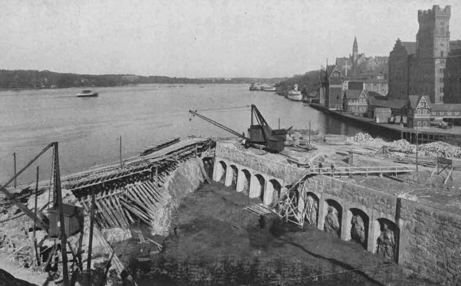 Danvikskanal mot Saltsjön 1925